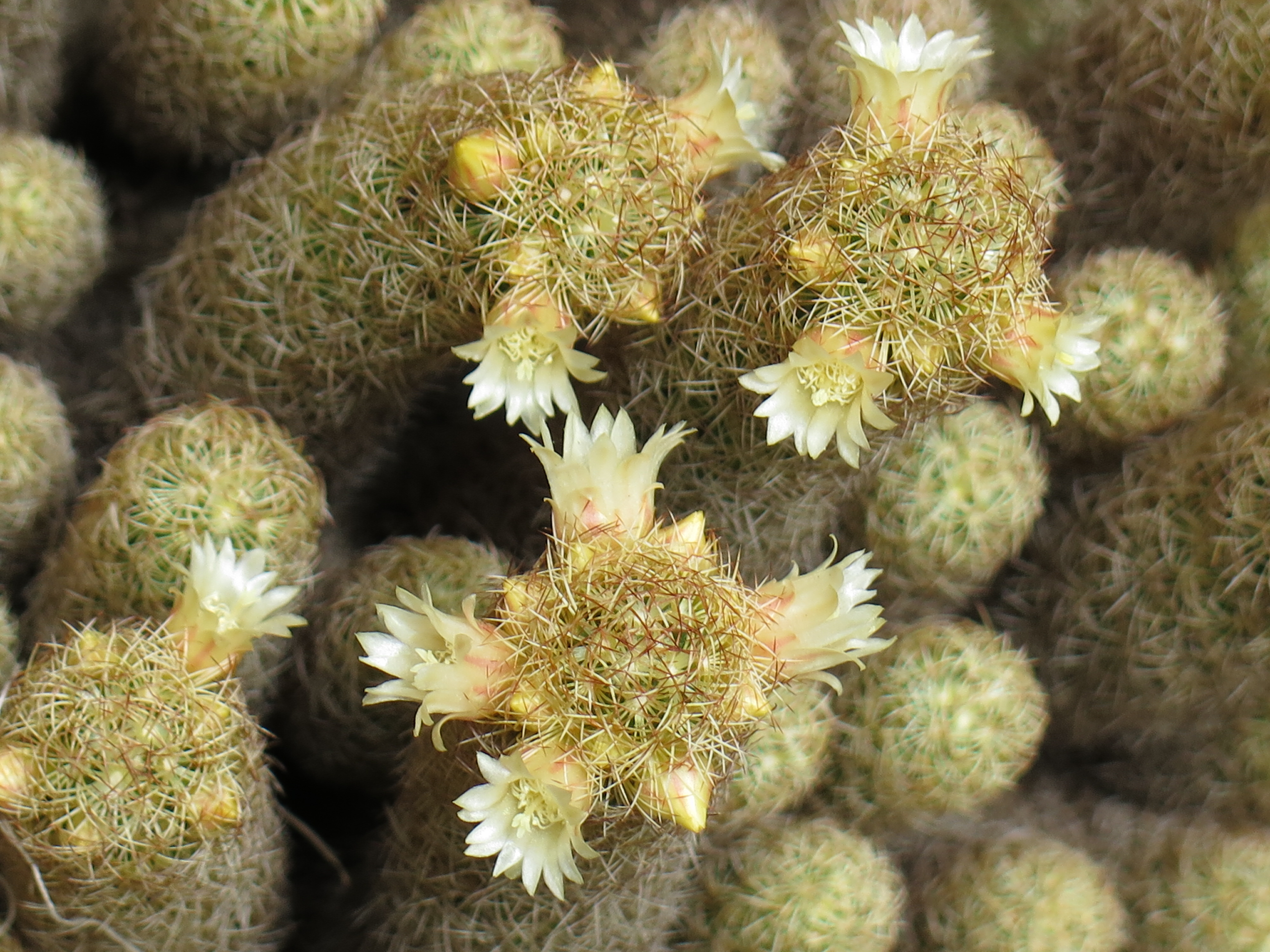 I fiori della mammillaria elongata